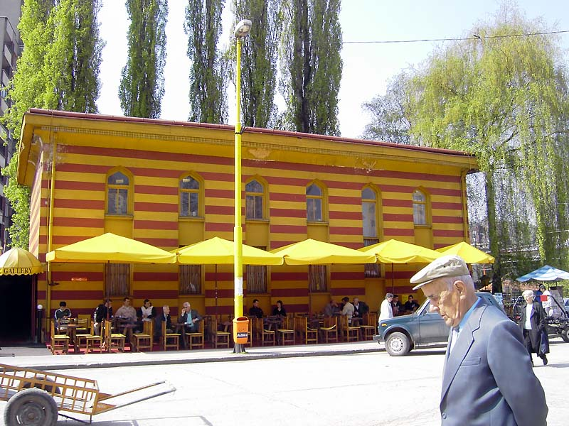 Zenica, Bosnia. Former Synagogue